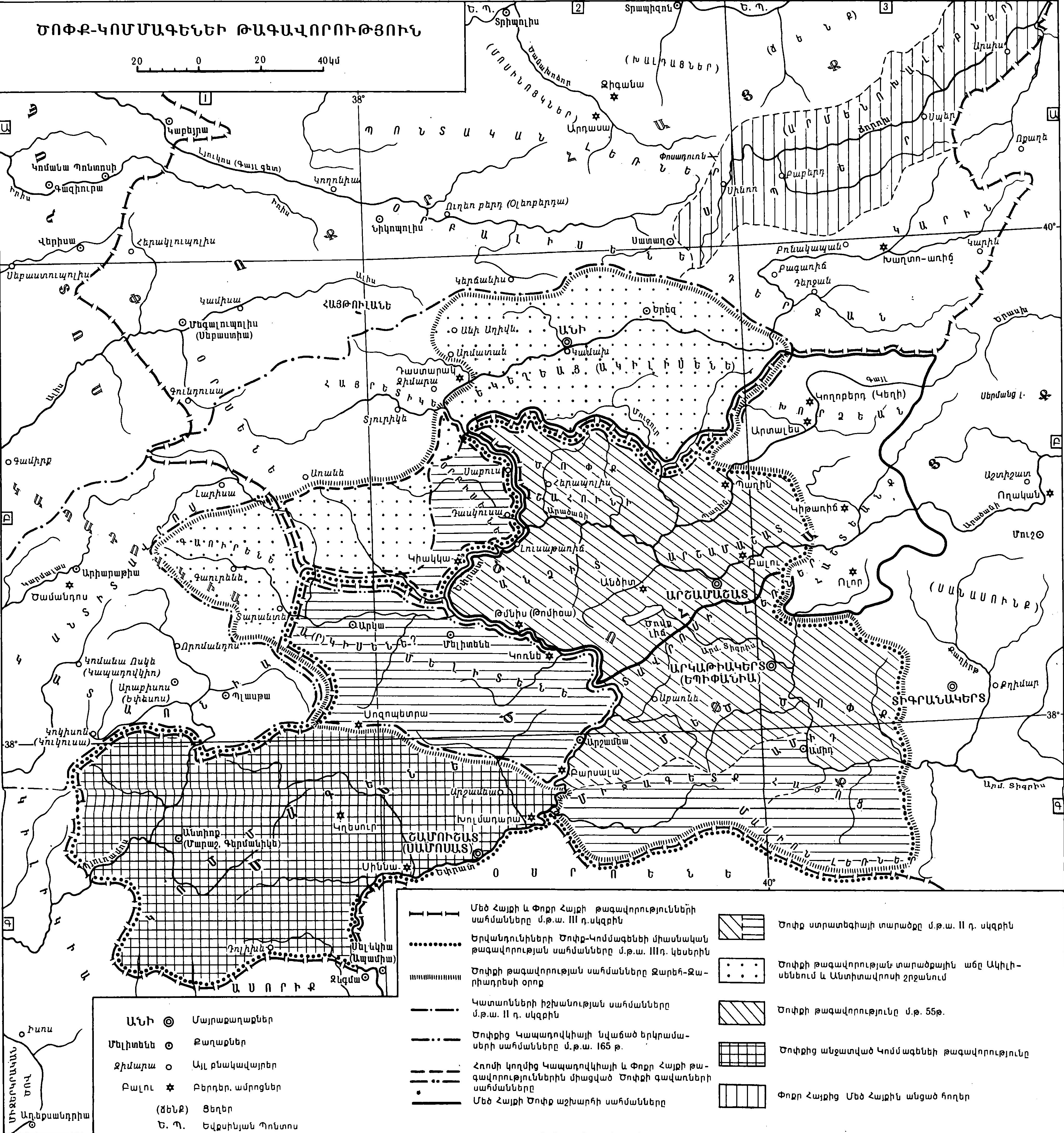 Մեծ Հայքի Ծոփք նահանգի քարտեզը (Ծոփք–Կոմմագենեի թագավորություն)